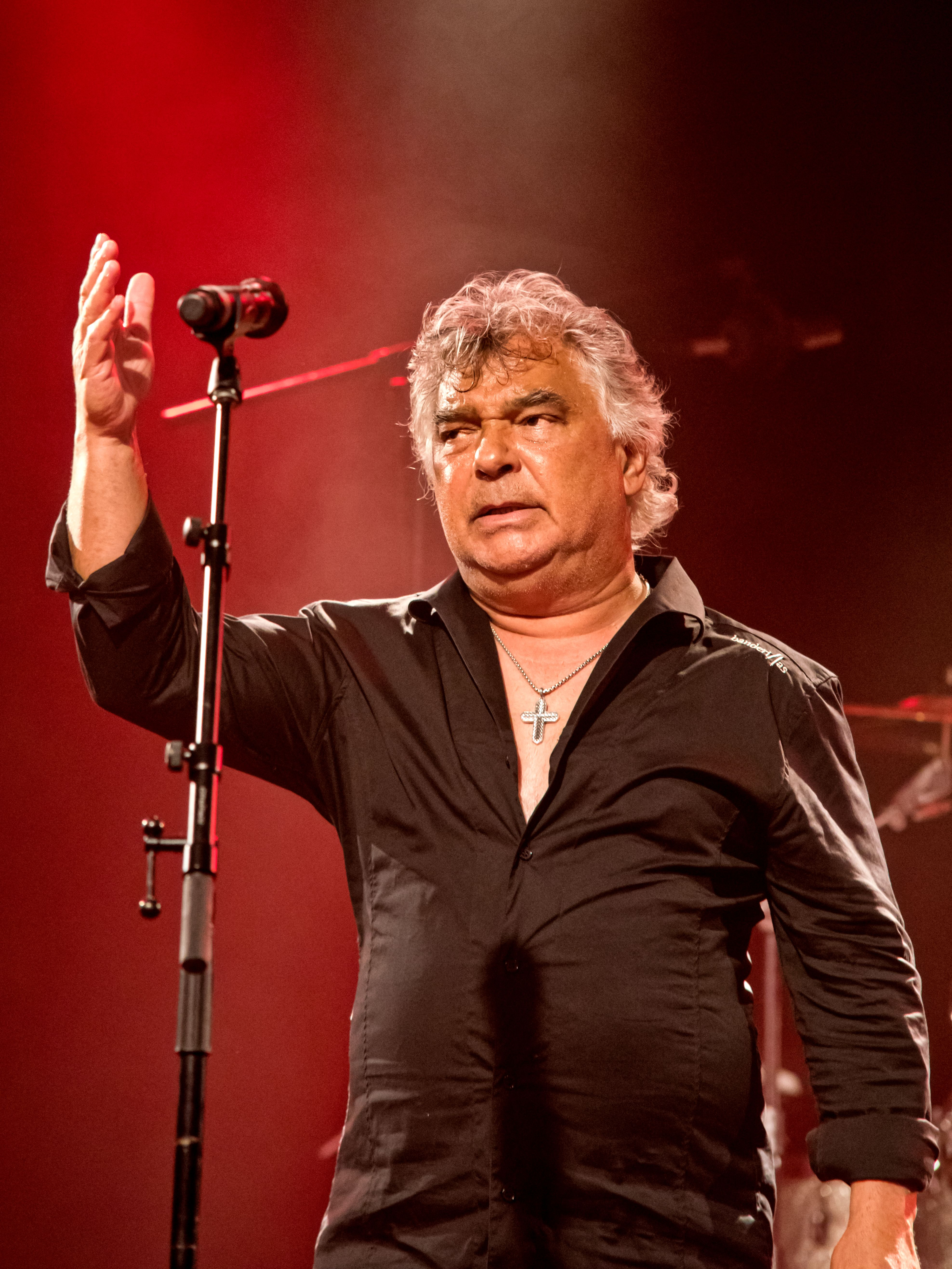 Bilder vom Zelt Musik Festival 2016 in Freiburg im Breisgau Gipsy Kings